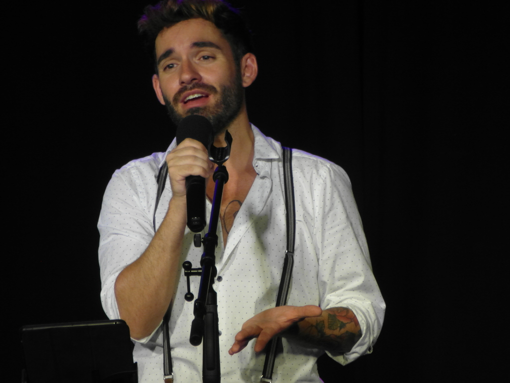 Piano und Stimme pur